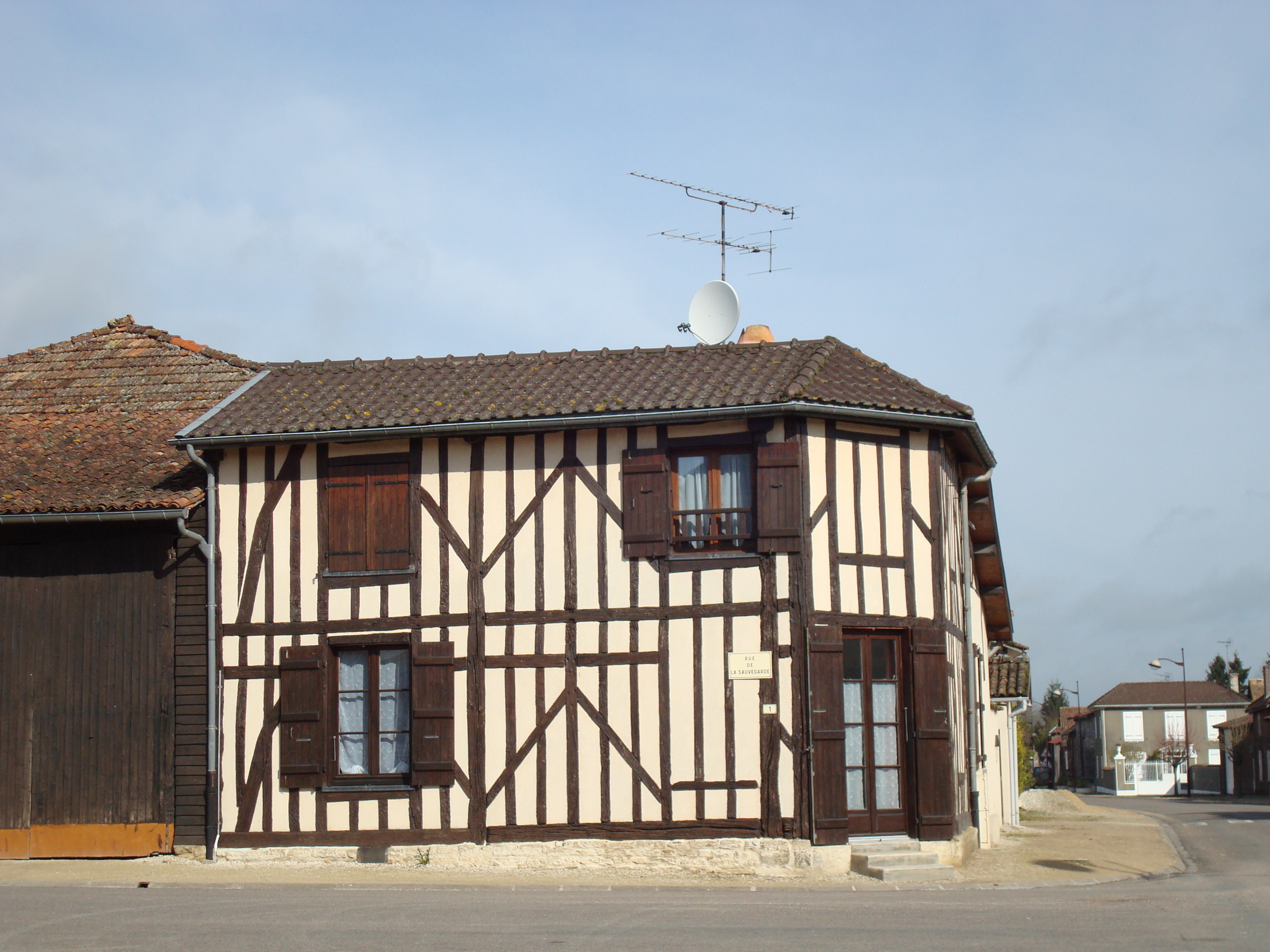 Hampigny